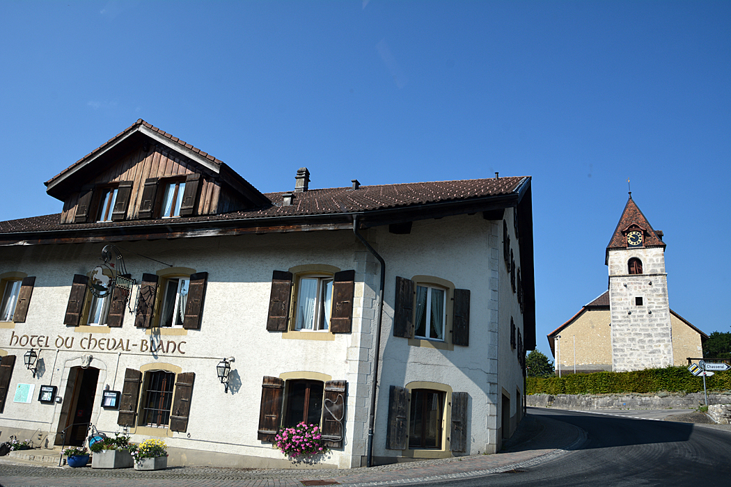 Zentrum von Nods, Kanton Bern